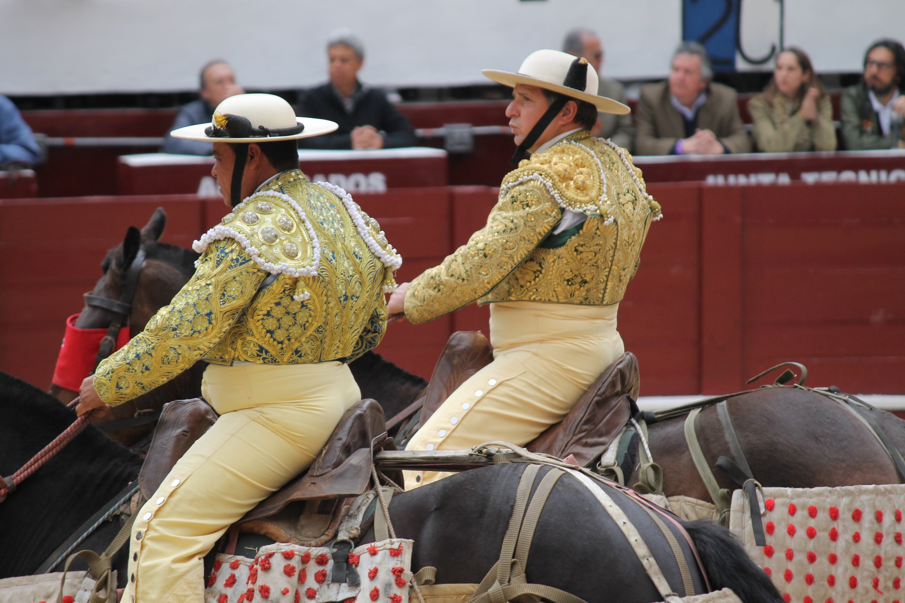 Paseillo en la Santa María de Bogotá